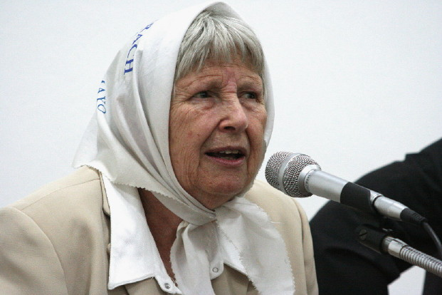 Vera Vigevani Jarach